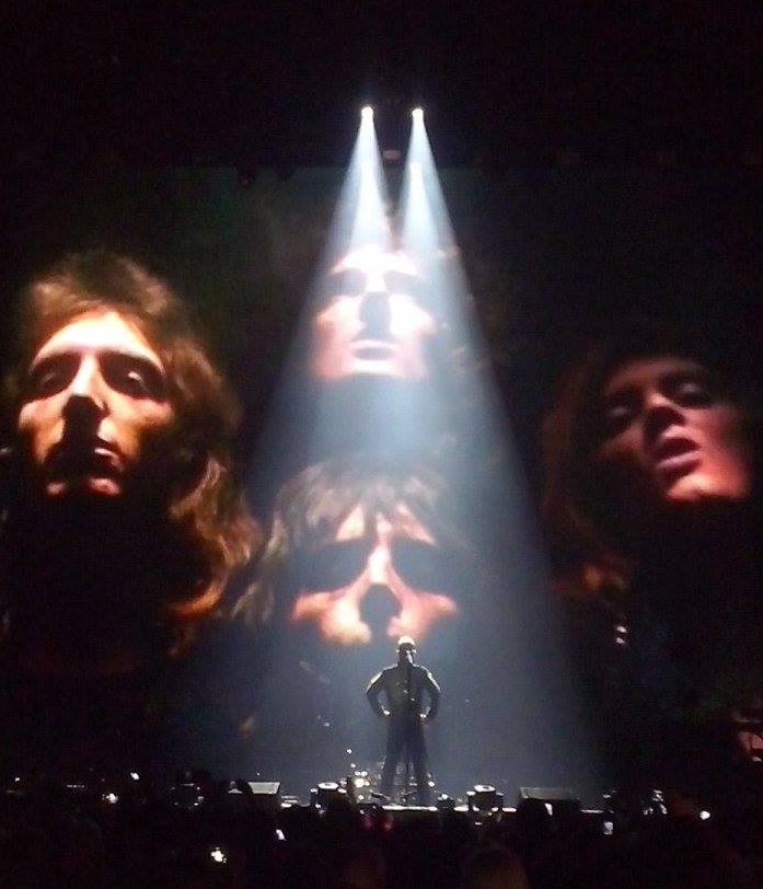 Robbie Williams wykonujący utwór „Bohemian Rhapsody” grupy Queen podczas koncertu w Krakowie w 17 kwietnia 2015 roku.